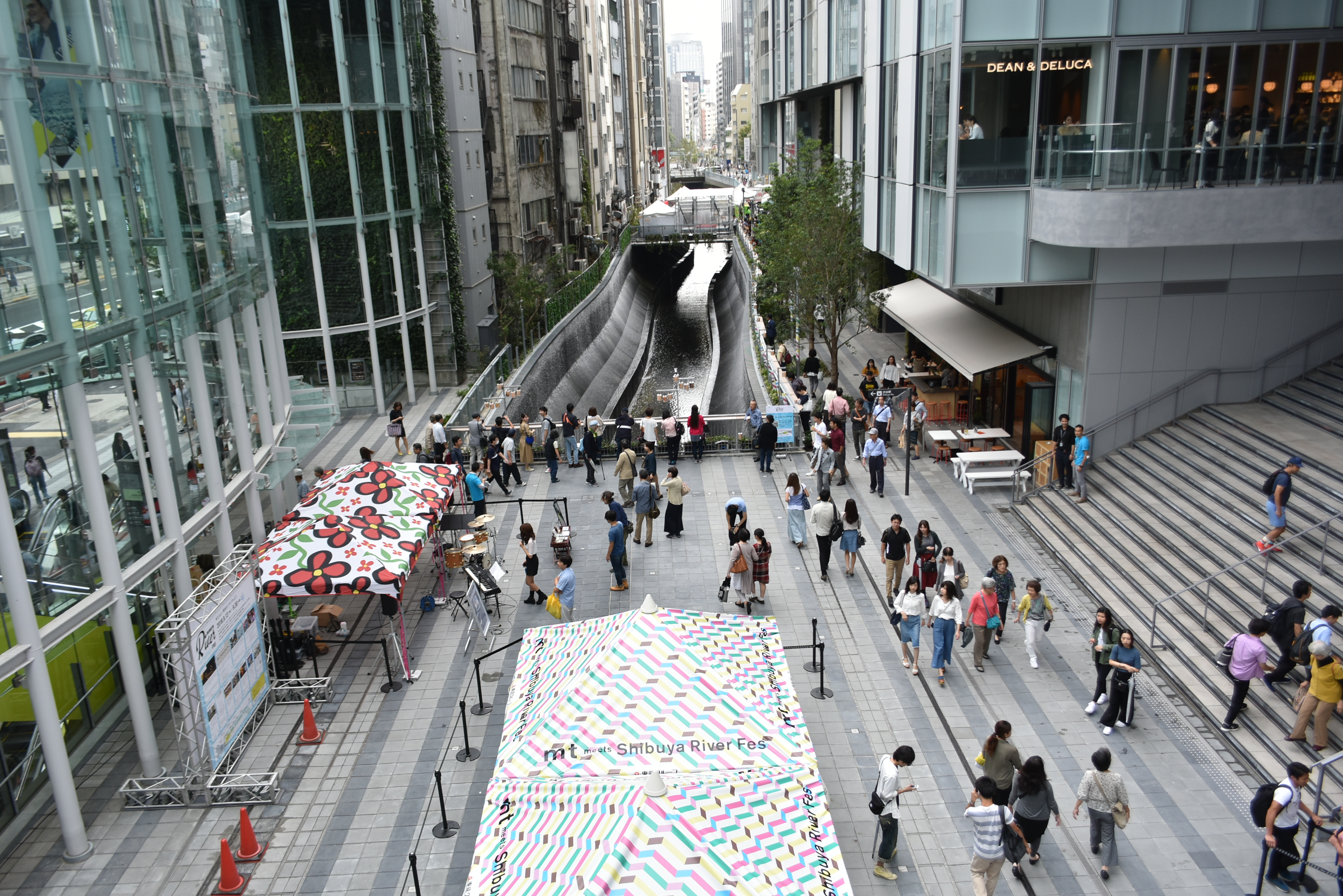 渋谷ストリーム